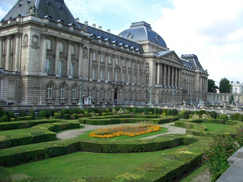 Palau reial de Brussel·les